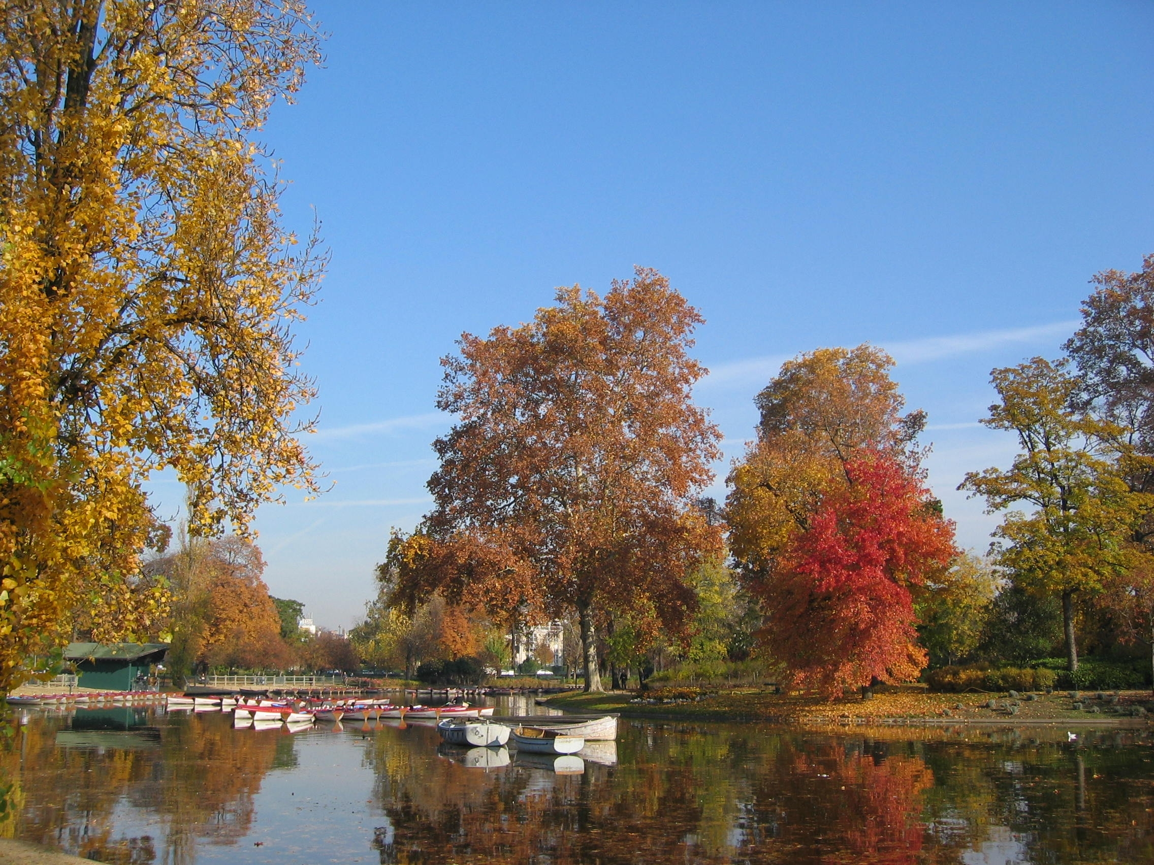 Lac Daumesnil en automne, Bois de Vincennes, Paris XIIe arrondissement